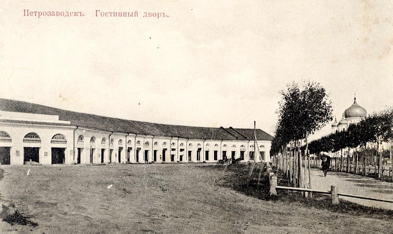 Гостинный двор в Петрозаводске